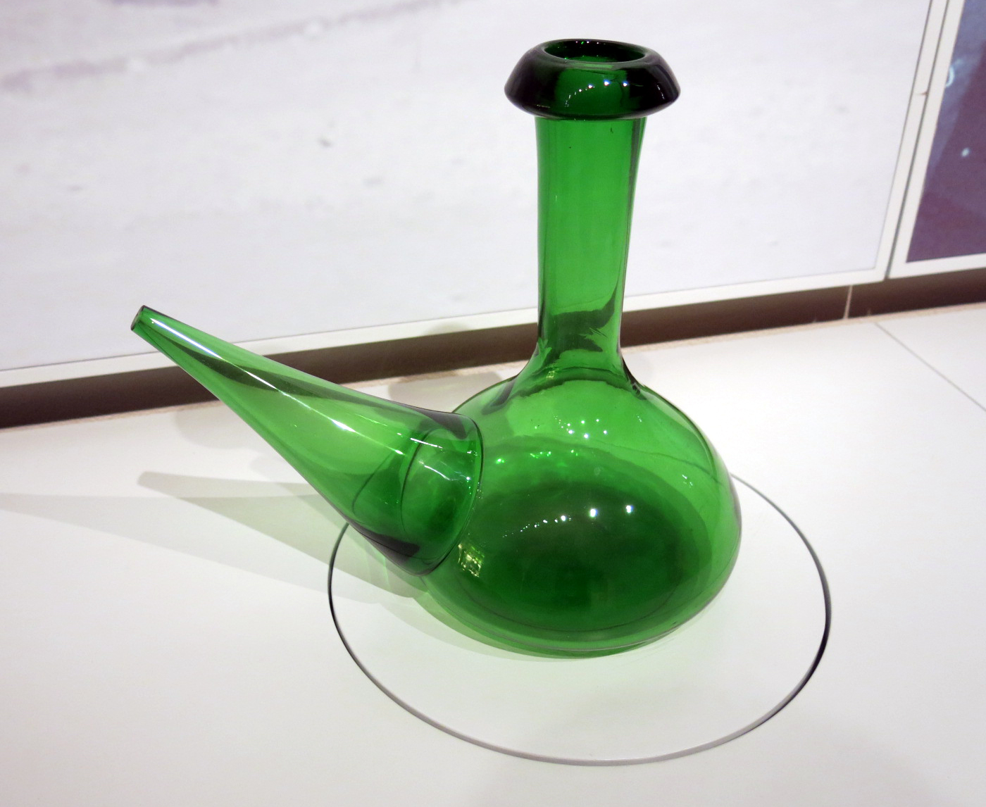 Palau Reial de Vilafranca del Penedès. Acull el museu VINSEUM, Museu de les Cultures del Vi de Catalunya)